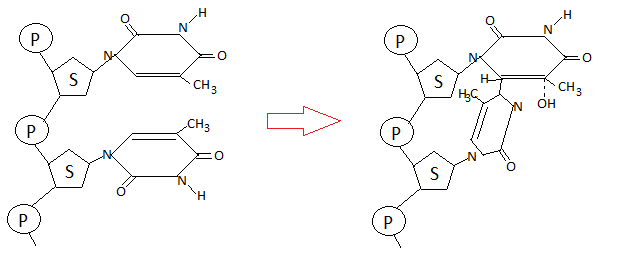 mutation obtenue après exposition à la lumière UV